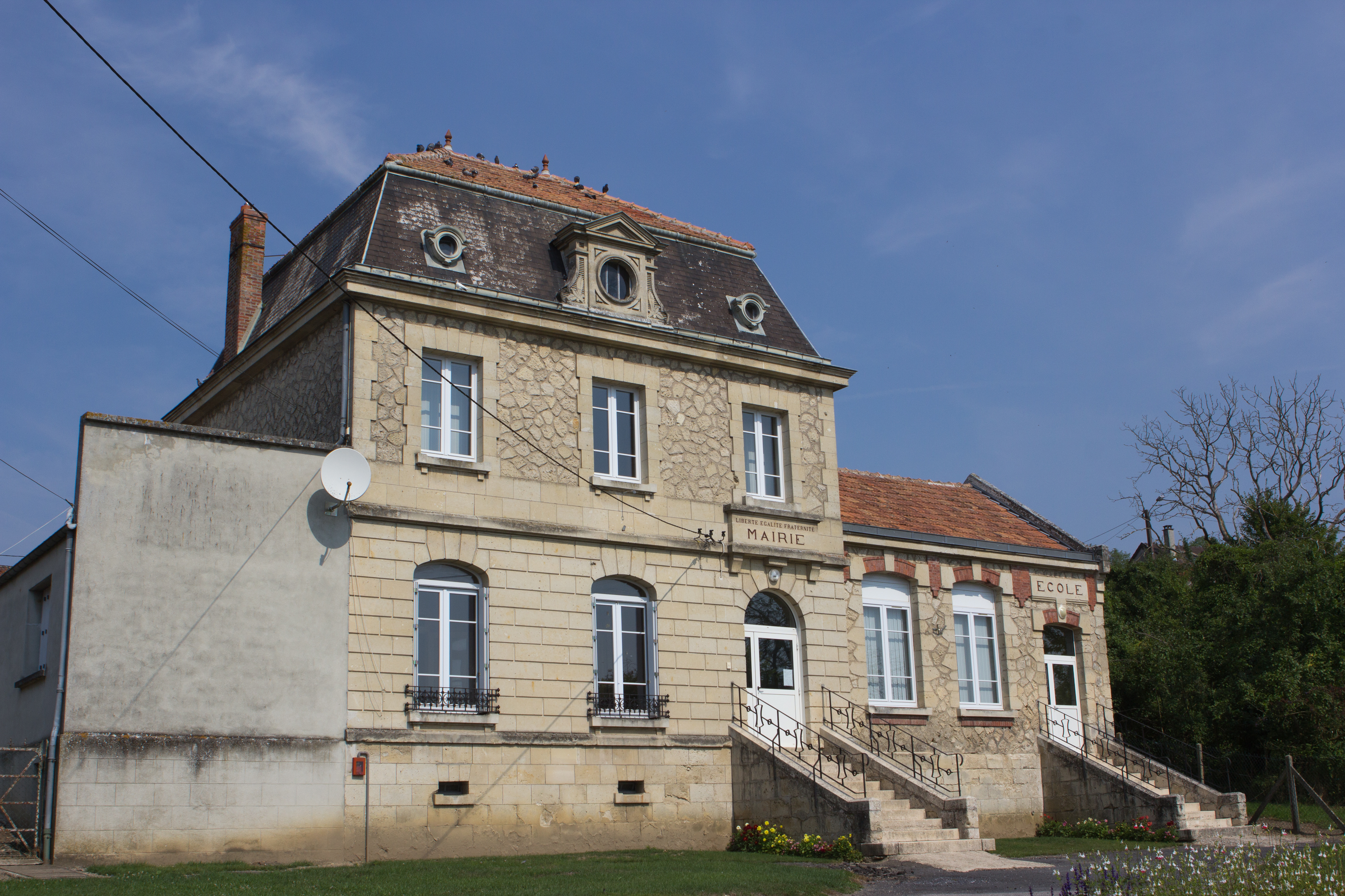 Mairie et école de Chamouille, Chamouille, Aisne, France